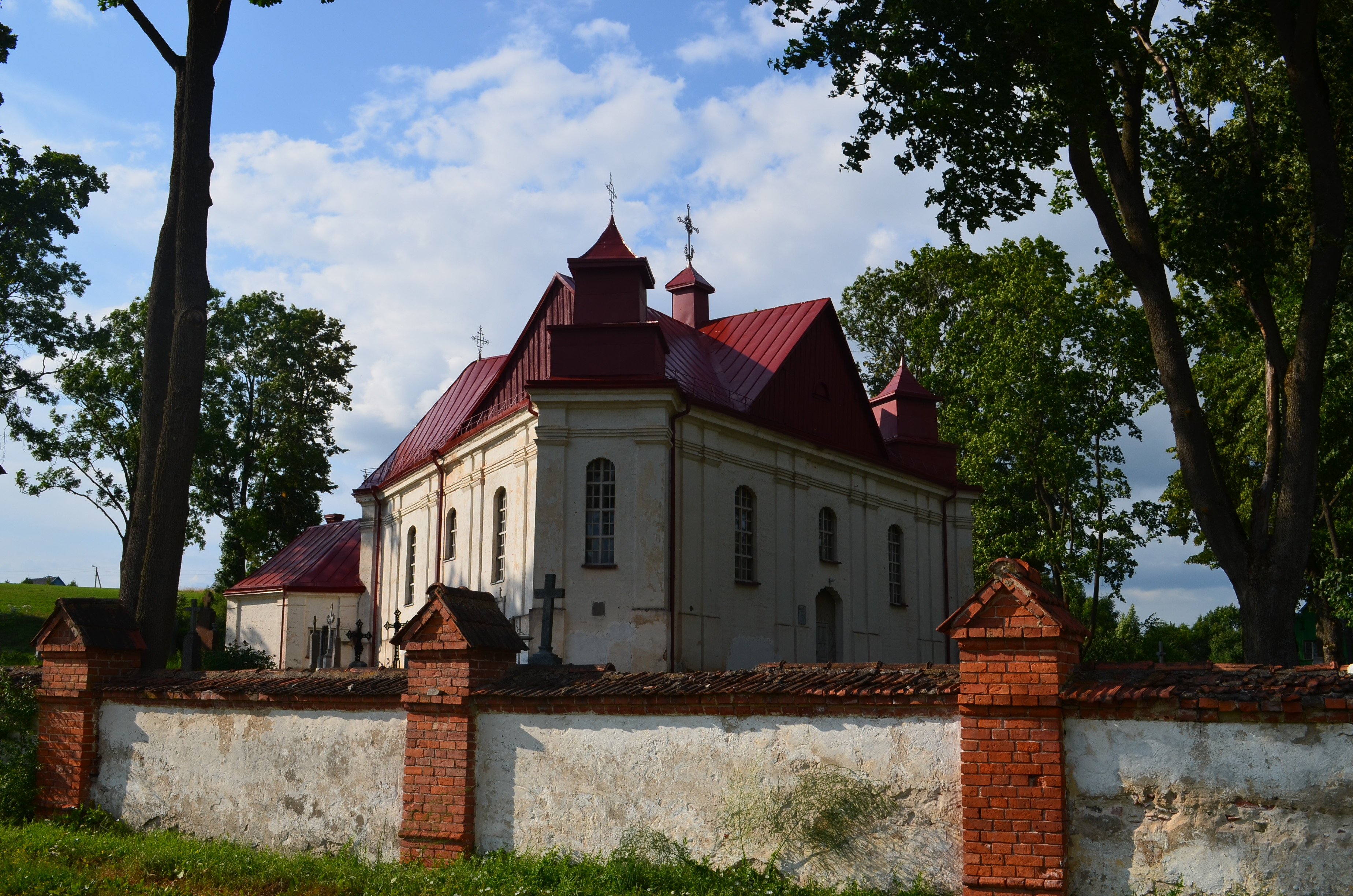 Panevėžiuko bažnyčia, Kauno raj.